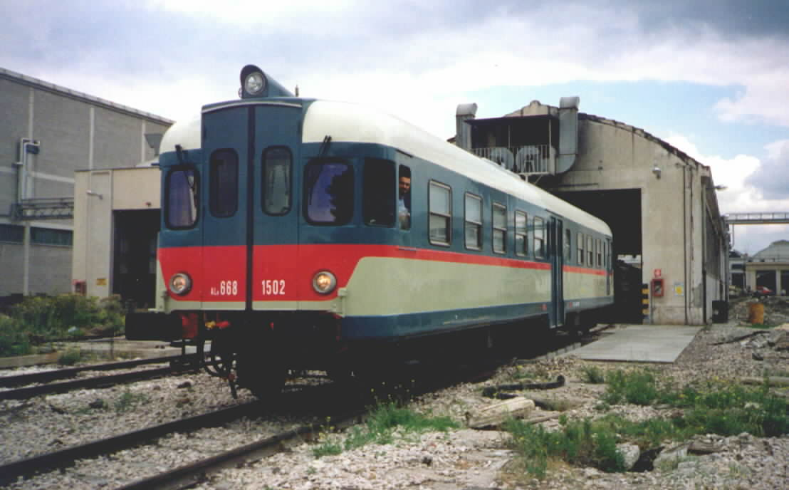 Automotrice Aln 668.1502 del Deposito Locomotive di Catania in uscita,per la corsa di collaudo,dalle Officine G.R. di Foggia delle Ferrovie dello Stato, dopo la "Grande Riparazione".